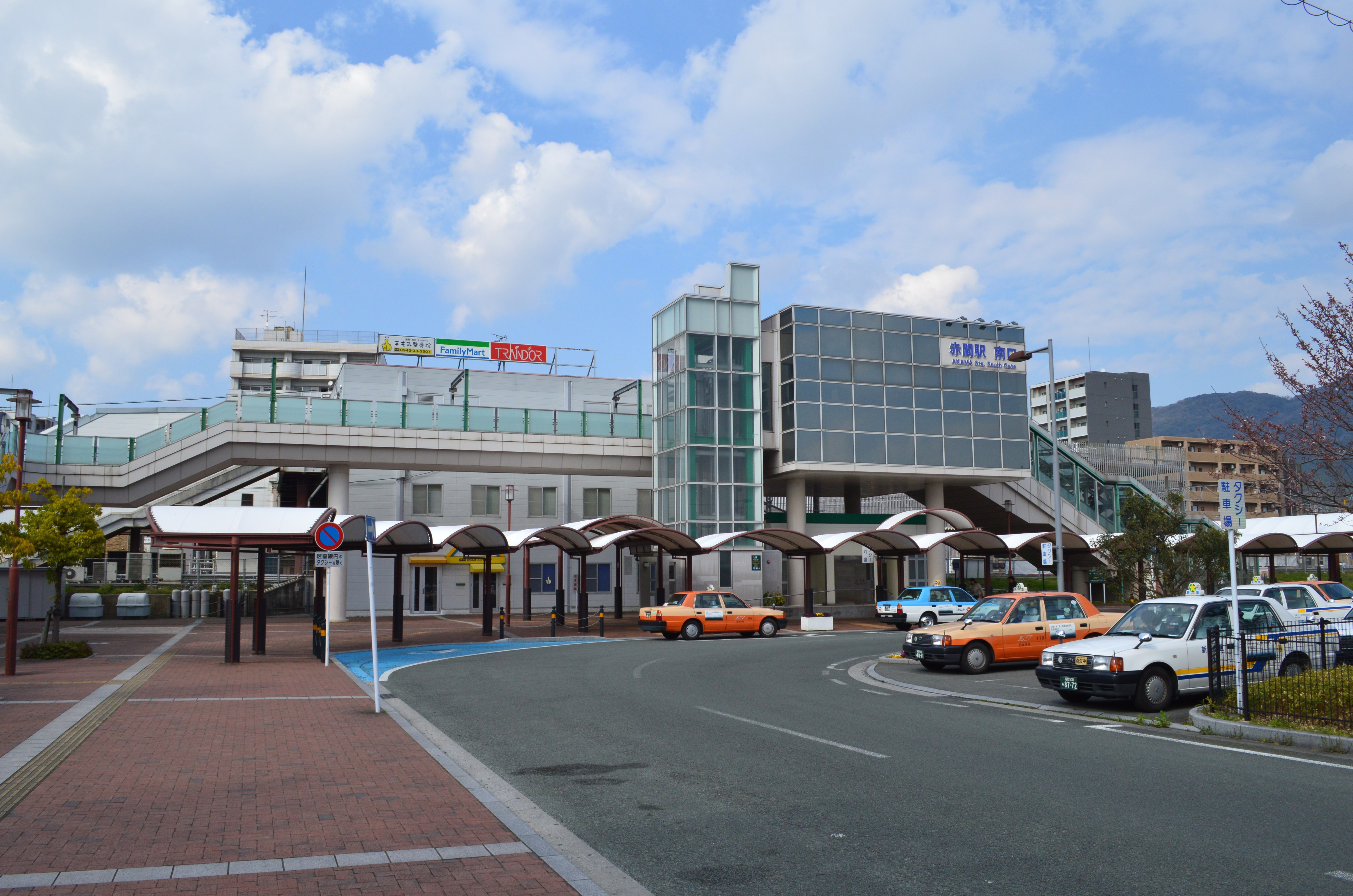 赤間駅 駅舎